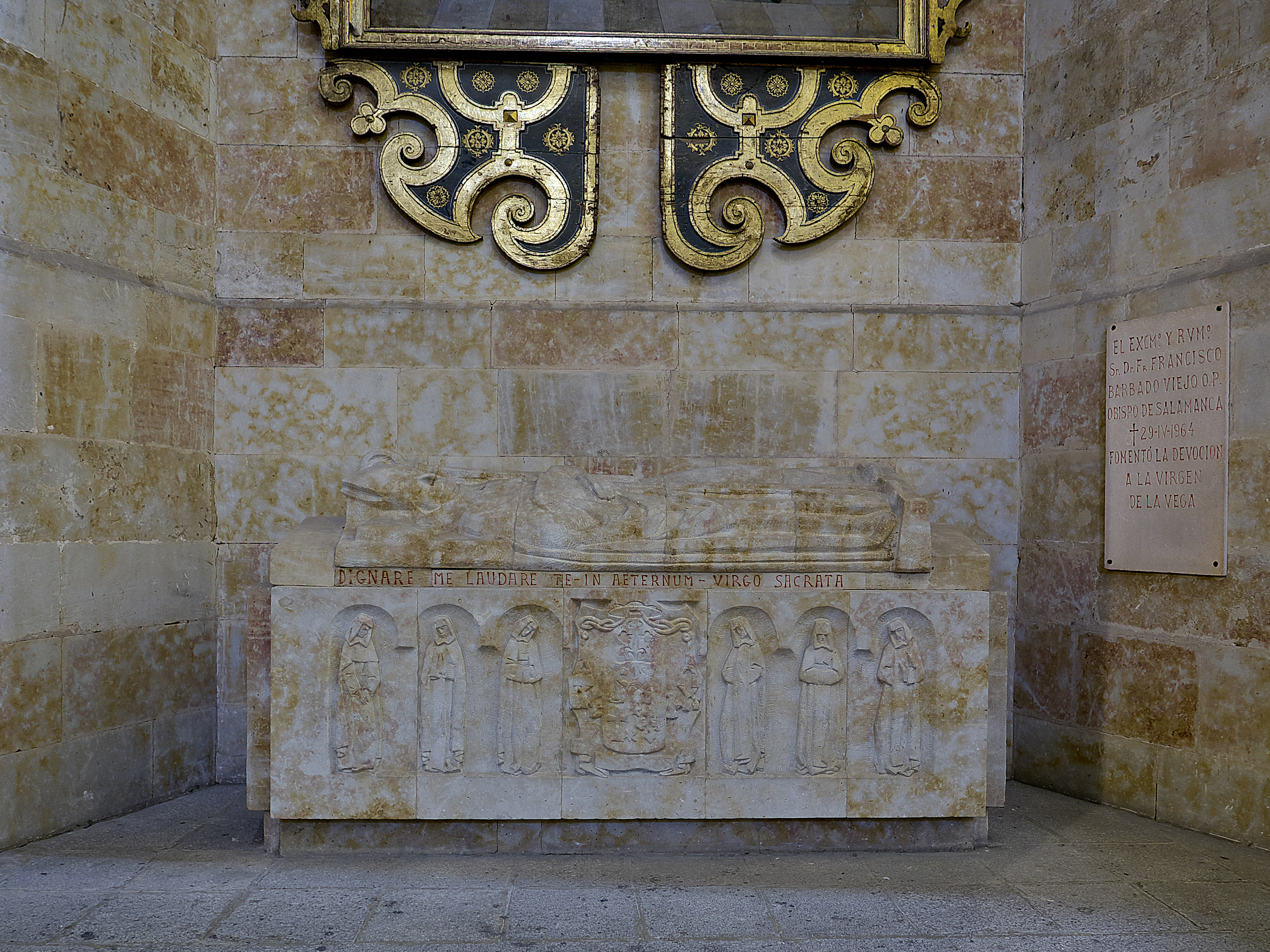 Sepulcro del obispo Francisco Barbado Viejo (†1964), nave del Evangelio de la Catedral Vieja de Salamanca.